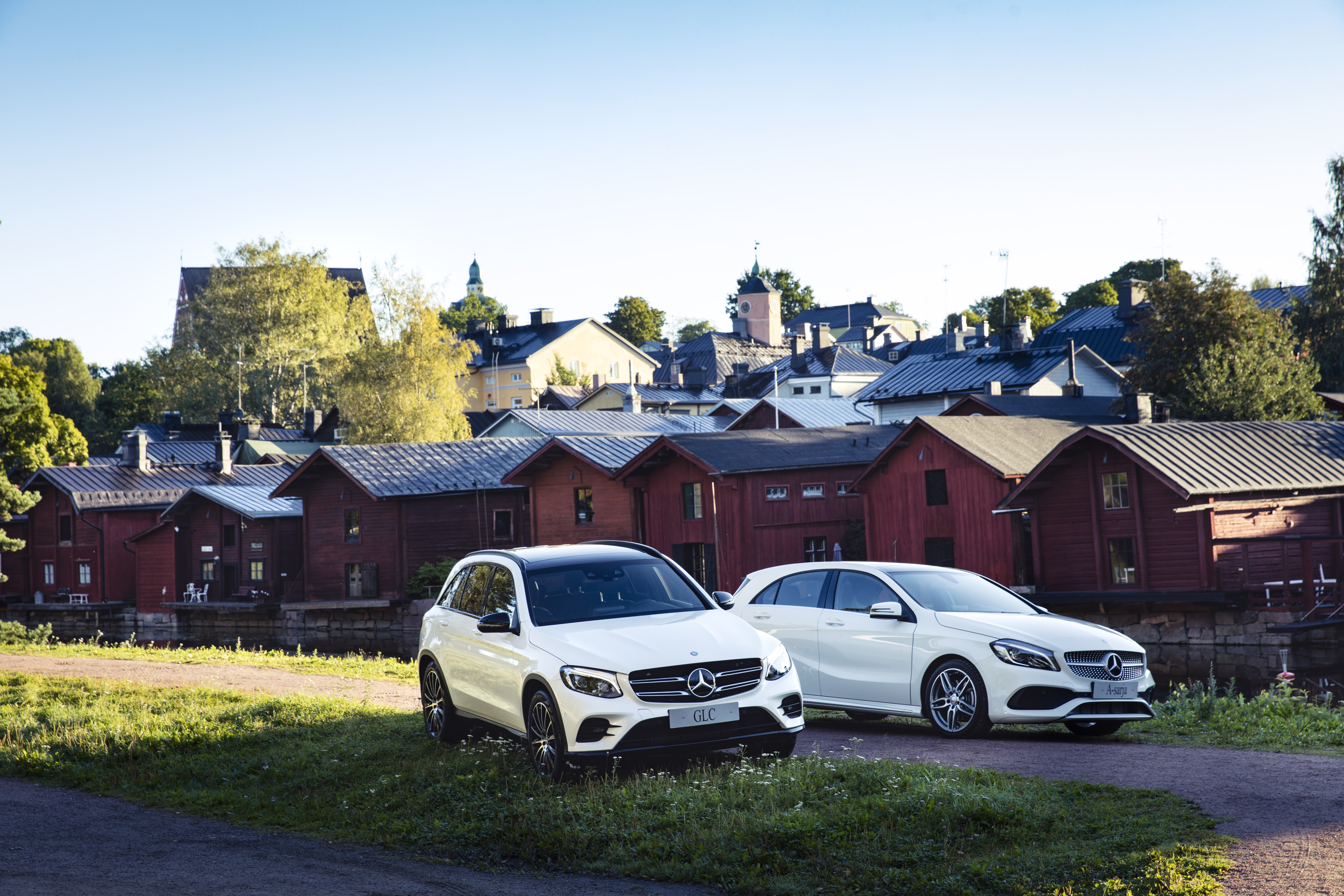 A-Klass und GLC